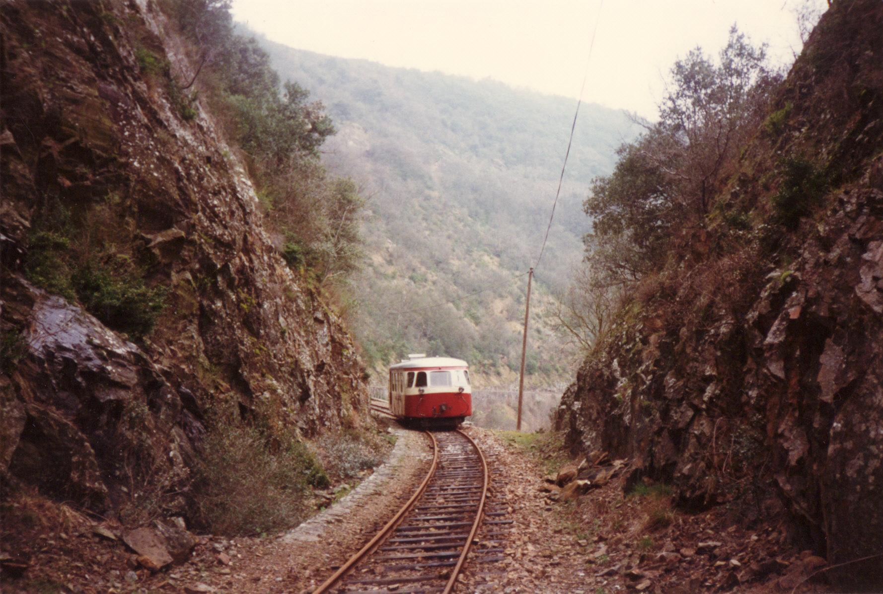 Un autorail modèle 314 dans un site rocheux, en aval de Colombier-le-Vieux.